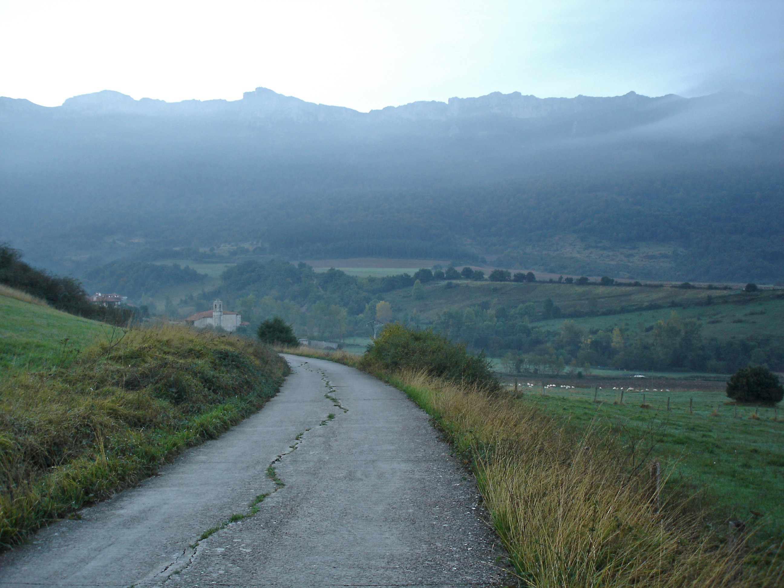 Valle de Ergoiena, Nafarroa